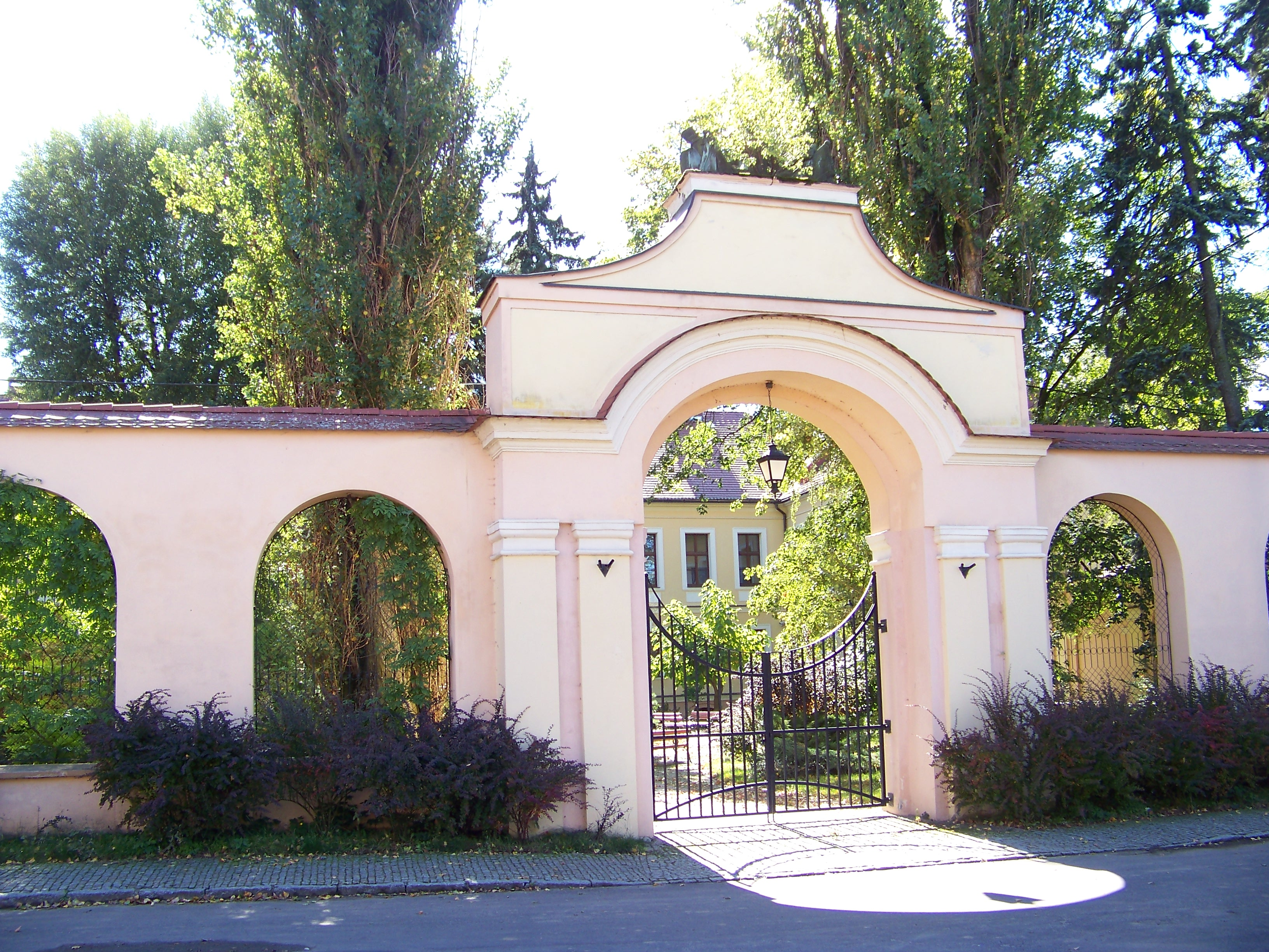 zespół pałacowy - pałac - ogrodzenie z bramami Lewin Brzeski, Lewin Brzeski 09.1964.